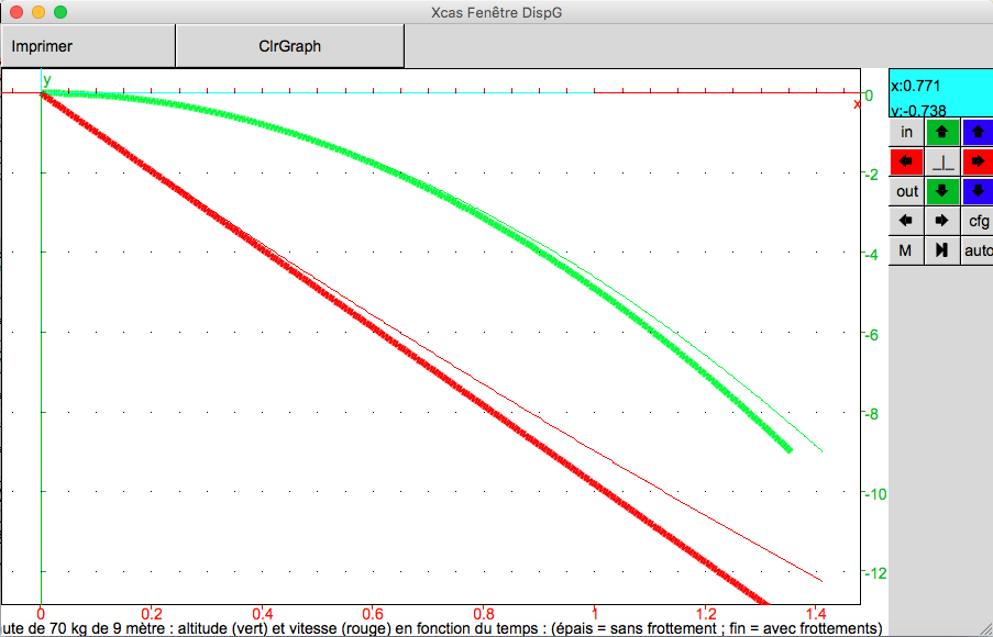 Graphiques superposés de deux modèle (avec et sans frottement) de la chute d'un objet de 70 kg de 9 mètre de haut.